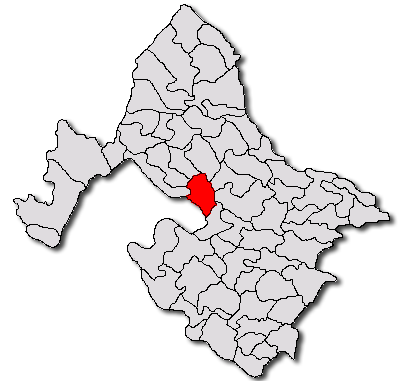 Categorie:Hărţi ale judeţului Mehedinţi